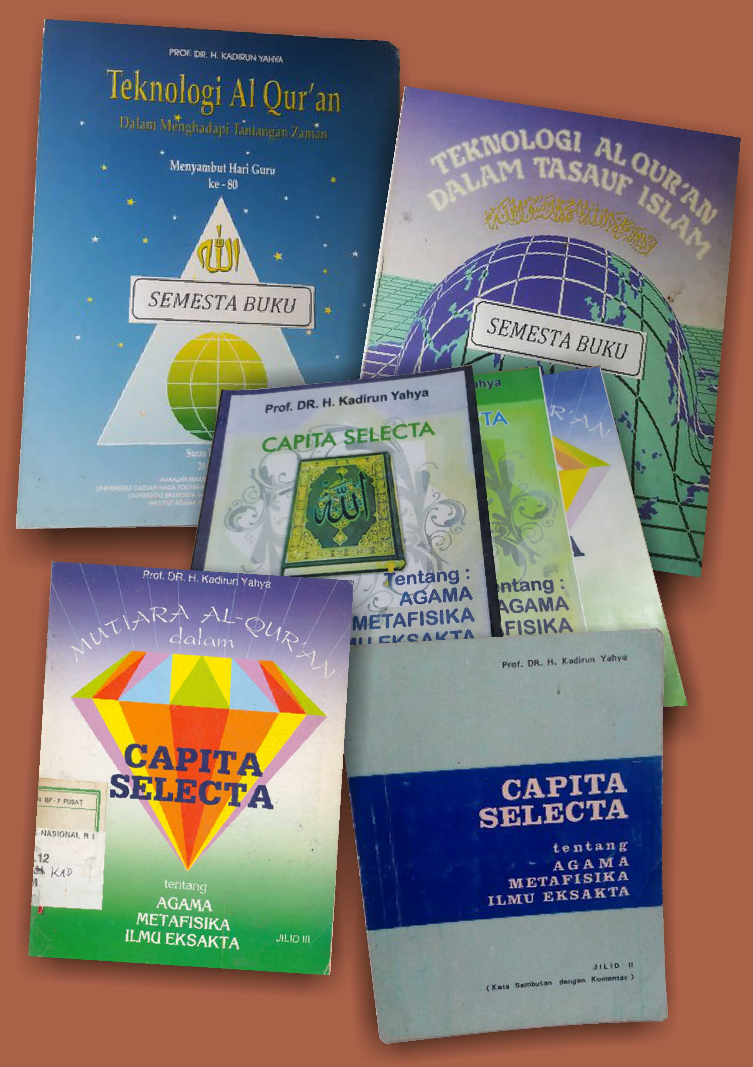 Sebagian dari buku-buku karya Prof. DR. H. Kadirun Yahya